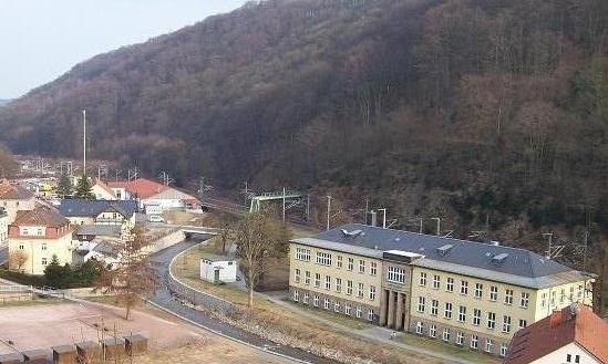 TU Dresden, Fachrichtung Forstwissenschaften, Cotta Bau Campus Tharandt